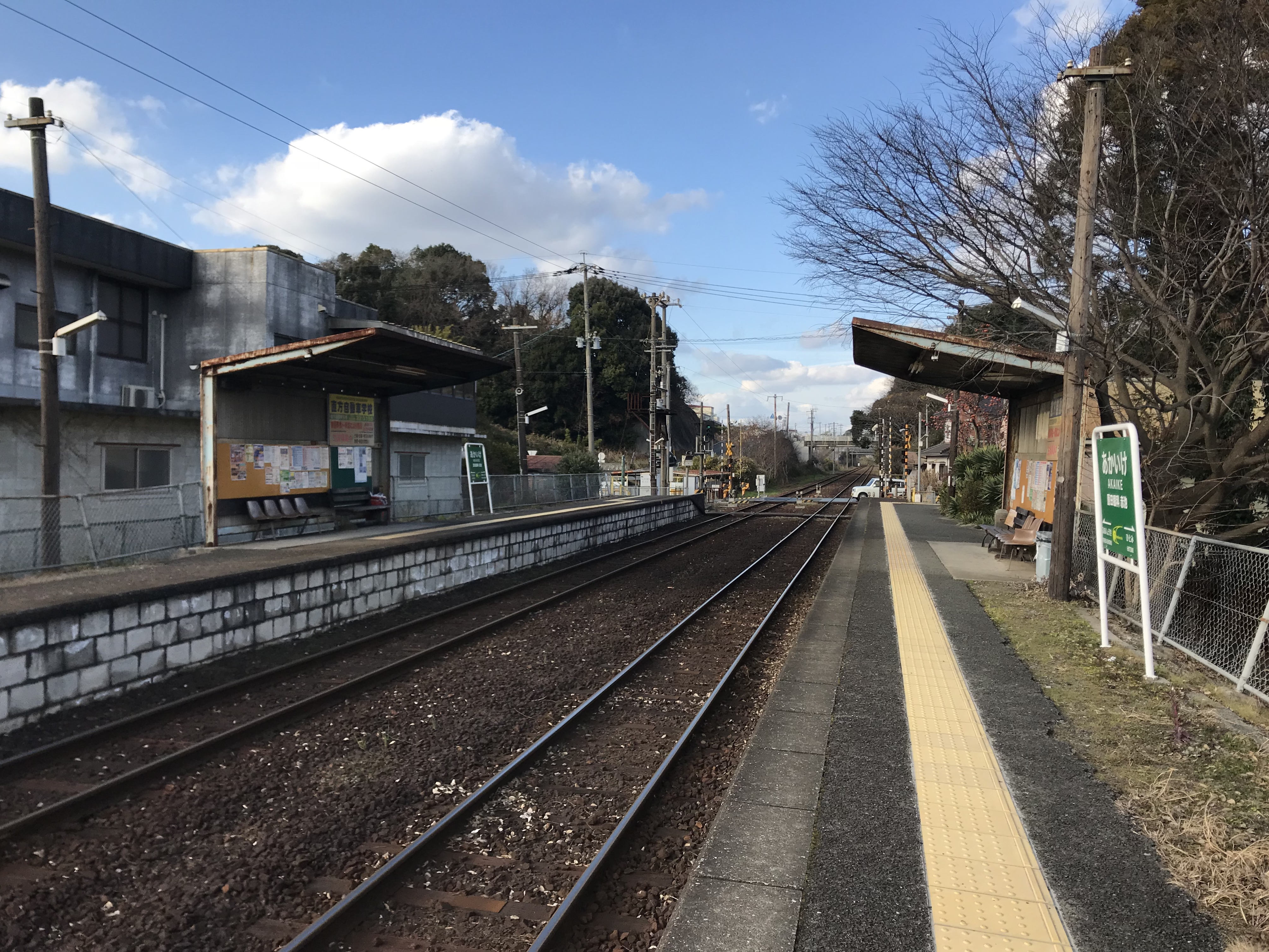 赤池駅のホーム(奥はふれあい生力方面)